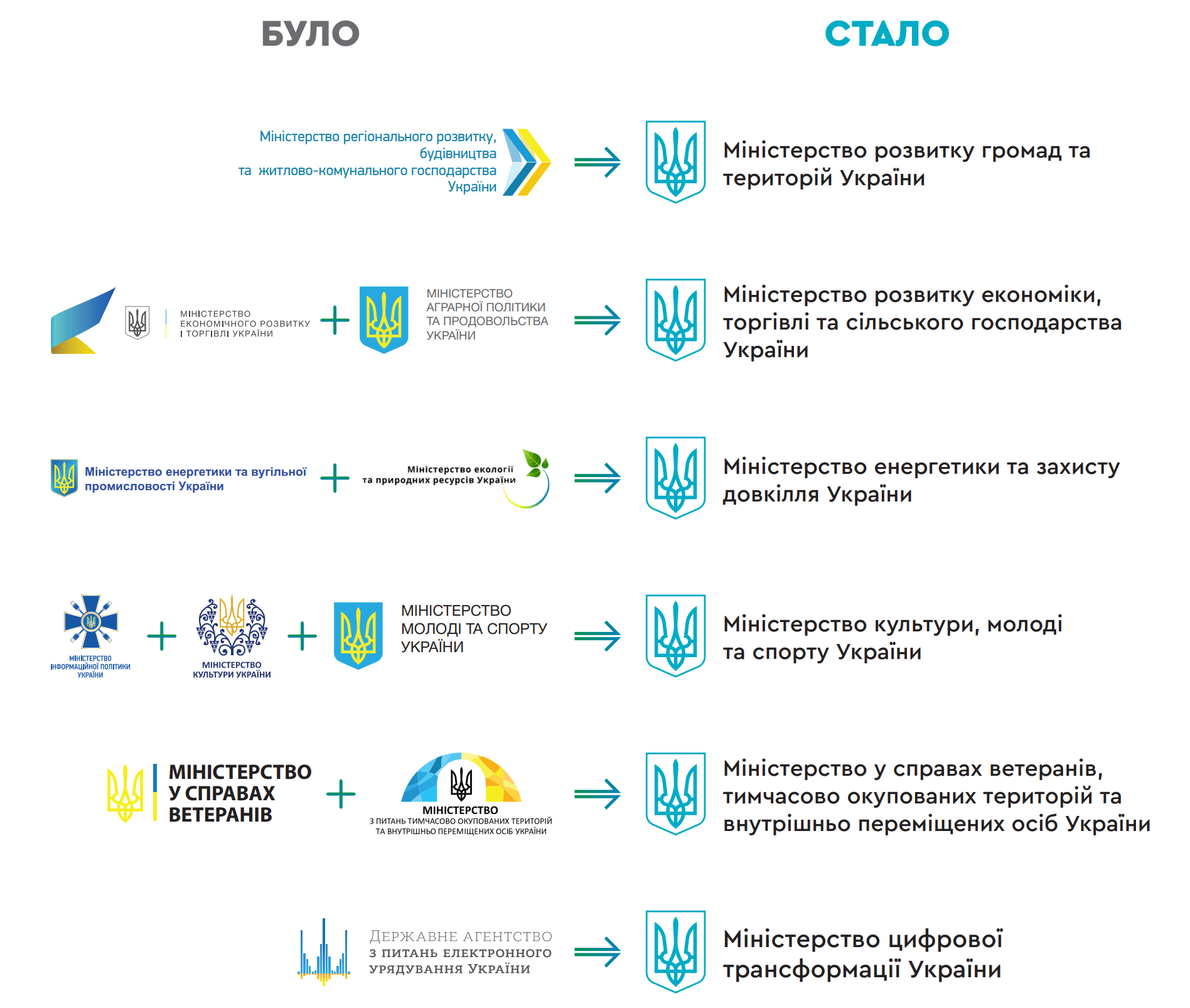 Нові міністерства у Кабінеті Міністрів України. Інфографіка